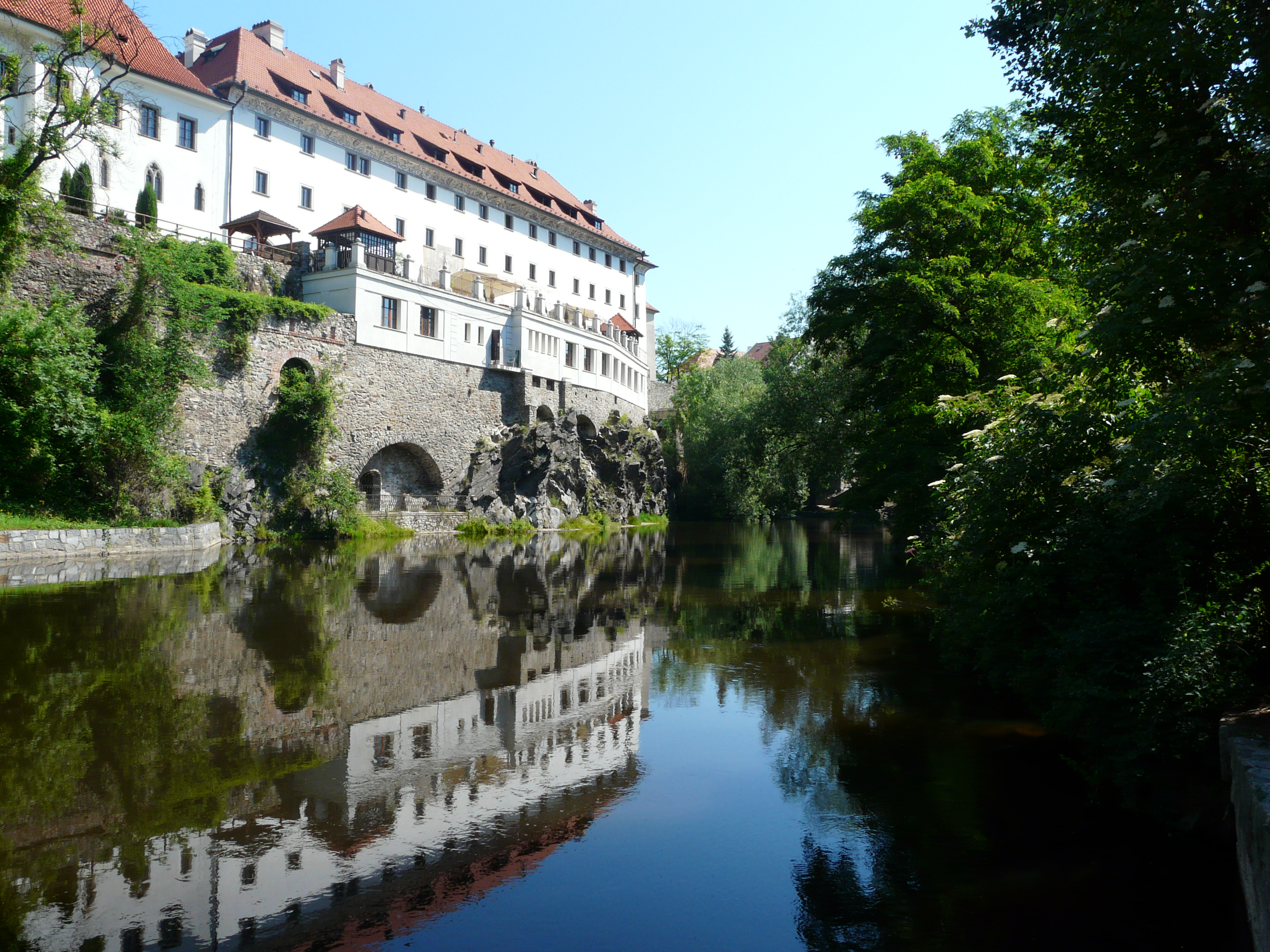 Růže Hotel in Český Krumlov (Krummau/Tschechien) mit der Moldau im Vordergrund